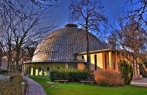 Zeiss-Planetarium in Jena, Seitenansicht mit Haupteingang